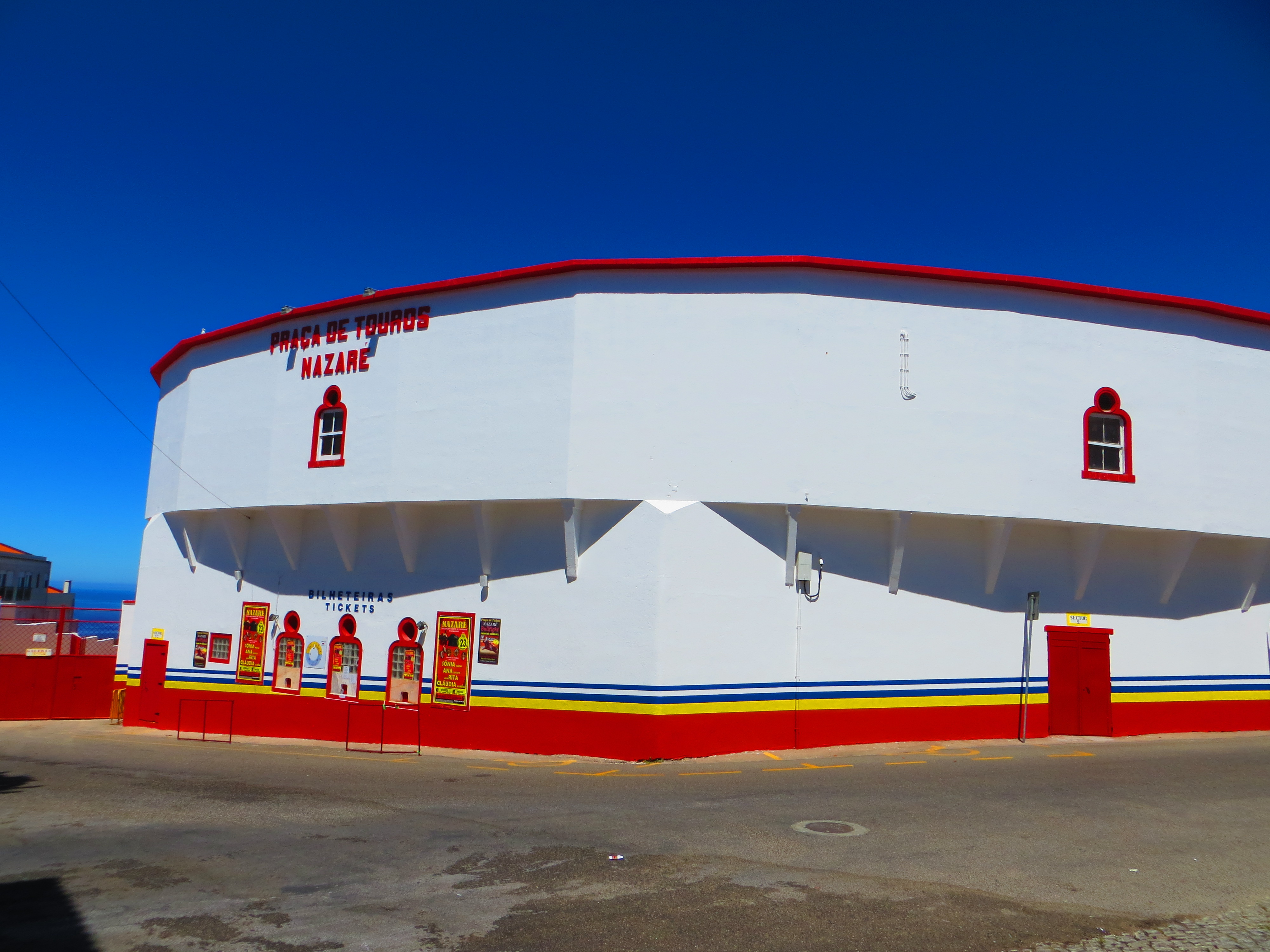 Praca de Touros Nazare